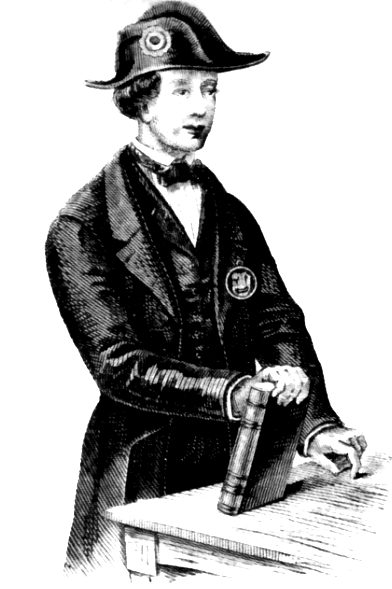 Estudiante del convictorio de San Carlos, Lima, Perú. Mediados del siglo XIX.